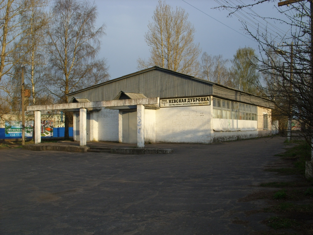 Невская Дубровка вокзал